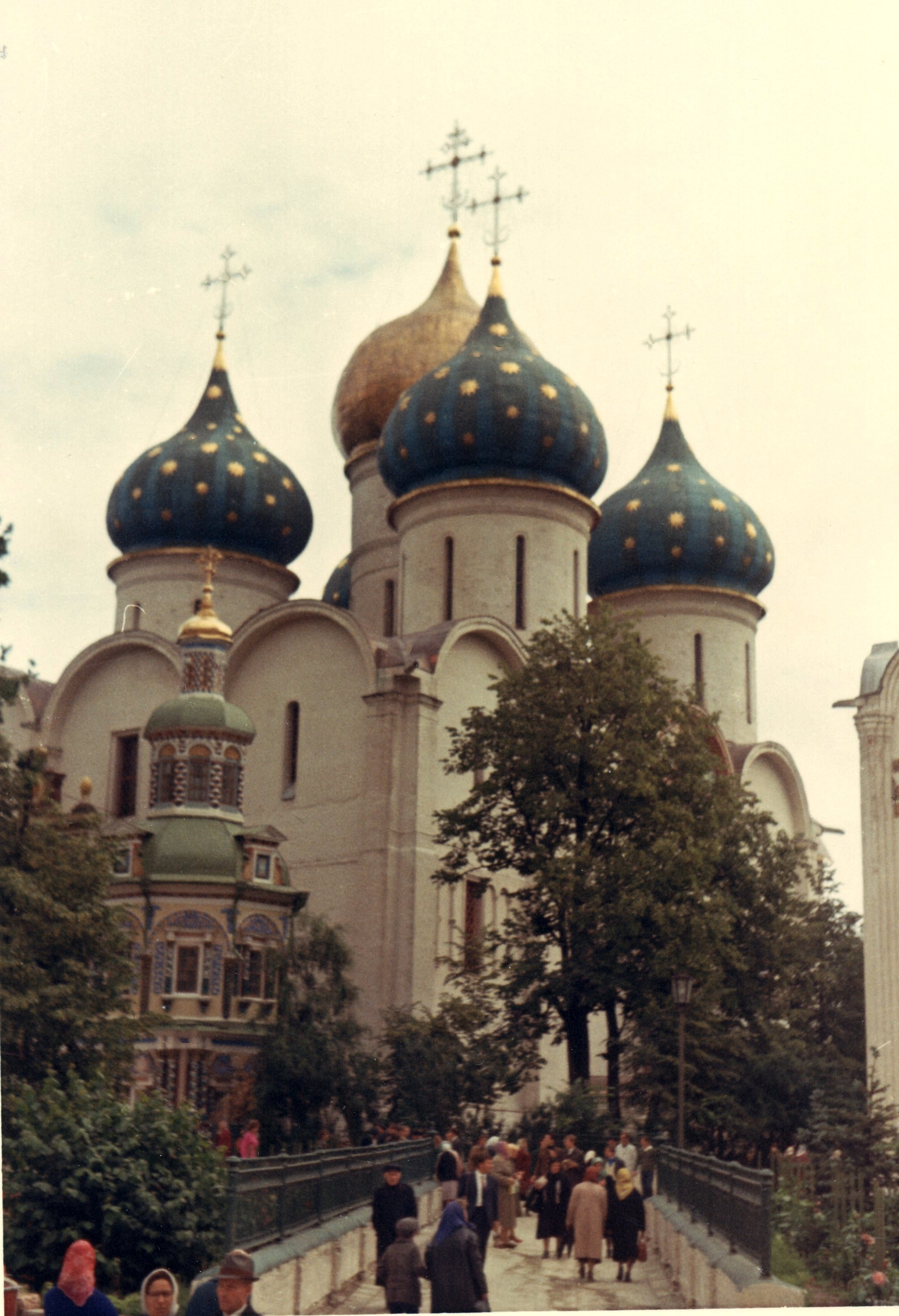 Dreifaltigkeitskloster von Sergijew Possad (Sagorsk), Russland